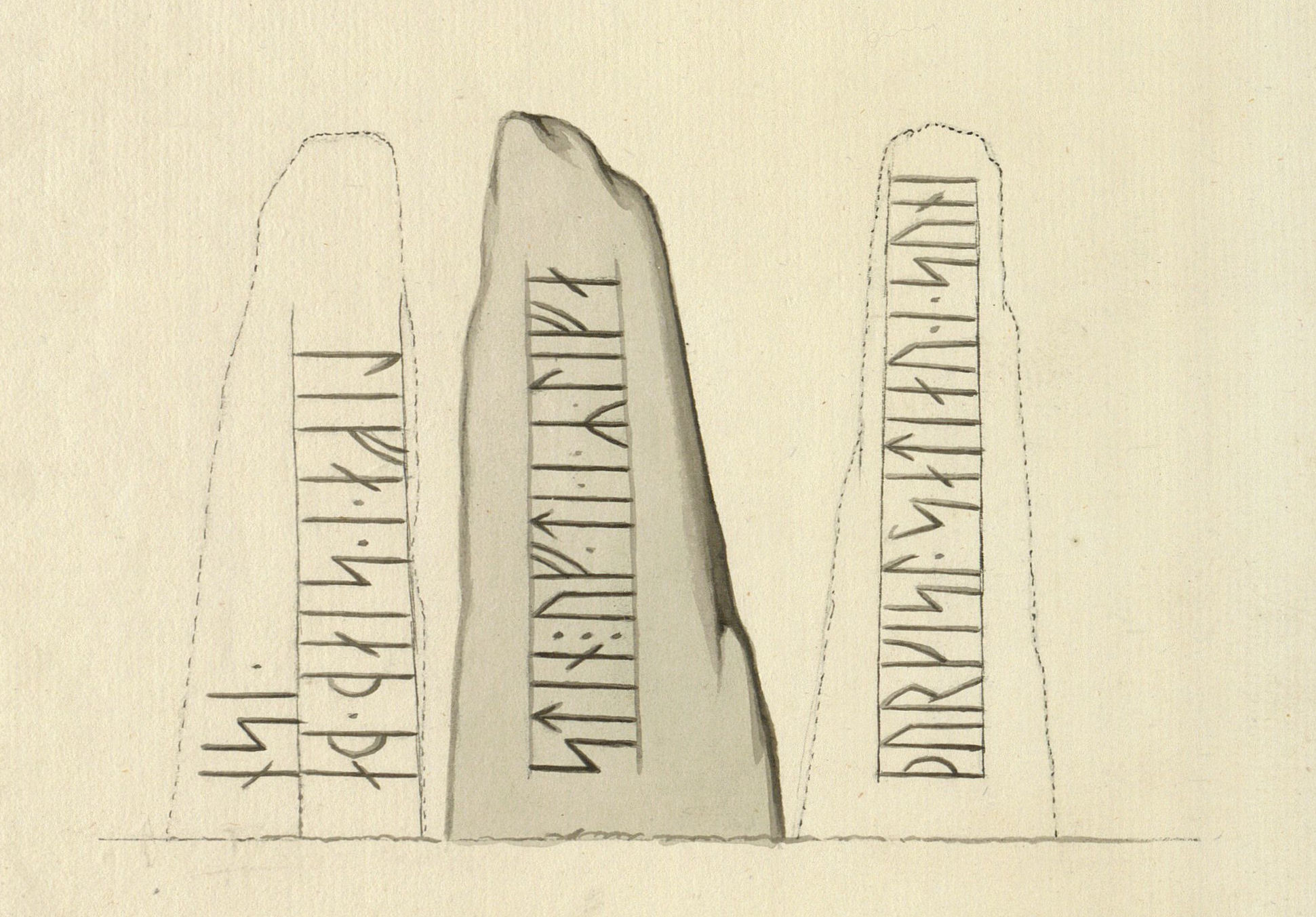 Denne Runesteen staaer opreist paa Marken strax Østen for Bondebyen Flarup i Udbye Sogn i Thyeland. Stenen er af almindelig Kamp eller Graasteens Art, den har fire fladagtige Sider, paa de 3 Sider er Runer, men ikke paa den 4de. Der siges, at den for omtrent 80 Aar siden, er forfløttet hid fra en Høy kaldet Helle-Høi Vesten fra Udbye beliggende. Ao 1767. S: Abildgaard. Litteratur: Danmarks Runeindskrifter nr. 149 (Ydby-stenen).